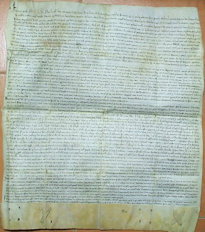 Documento fechado en Segovia en 1.215, en el que se hace referencia a los encierros de Cuéllar (Segovia)